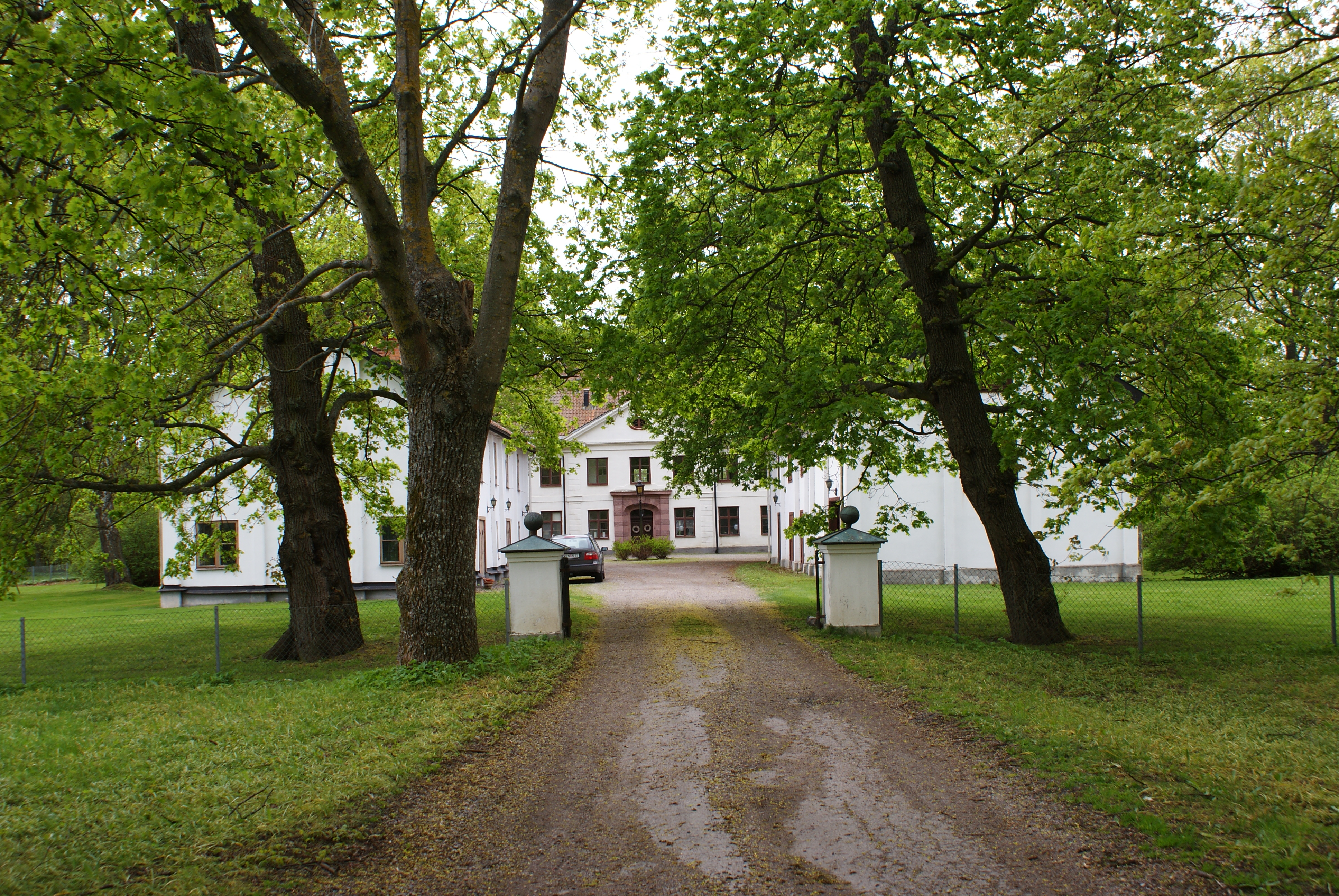 NORRKÖPING HIMMELSTADLUND 1:1 - husnr 1 (Corps-de-logi) in Norrköping